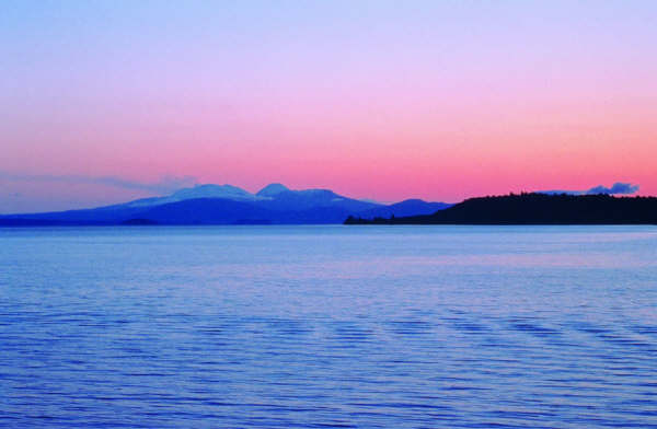 zelf gemaakt